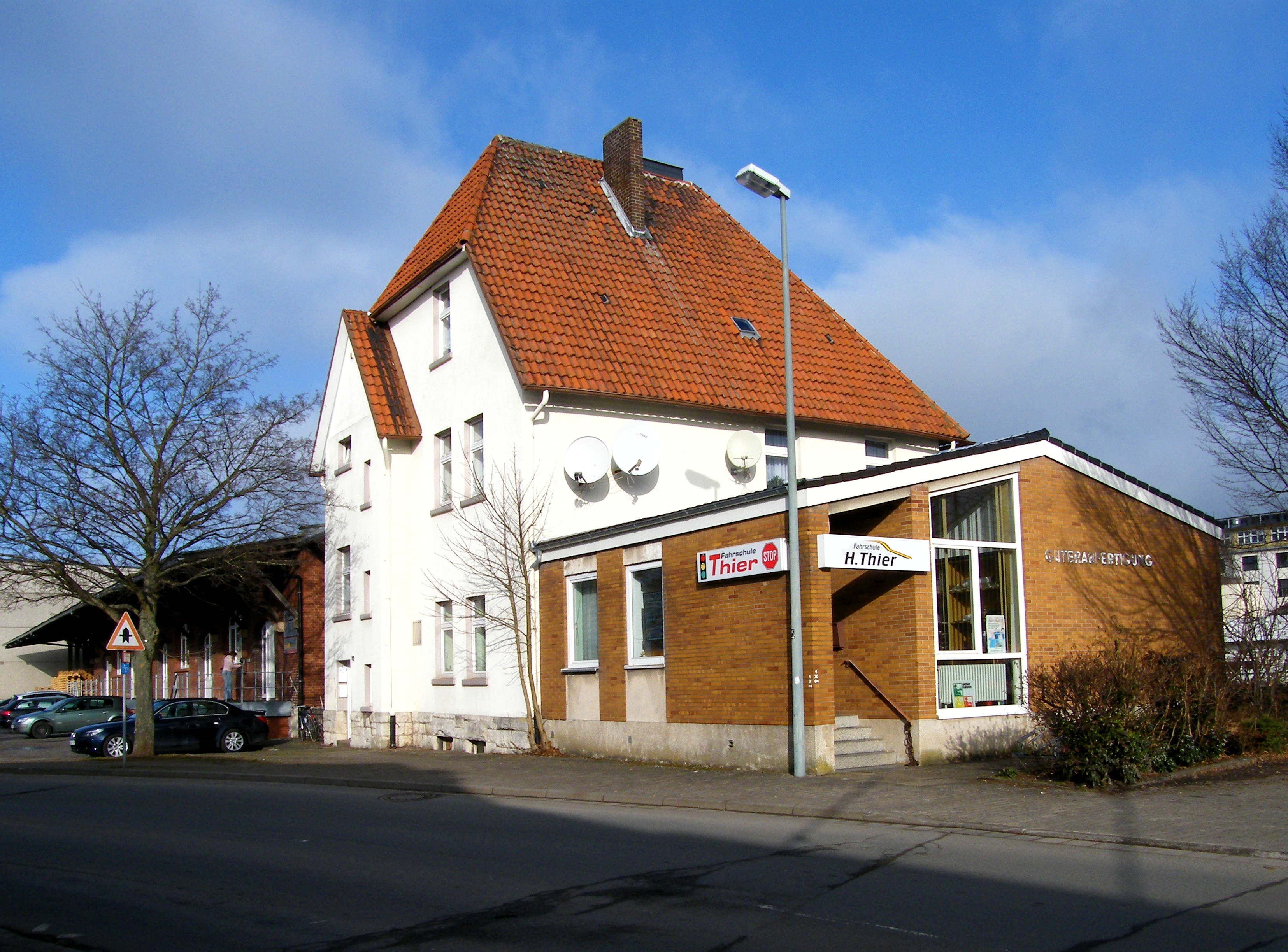 Güterbahnhof Bahnhof Korbach mit Güterabfertigung